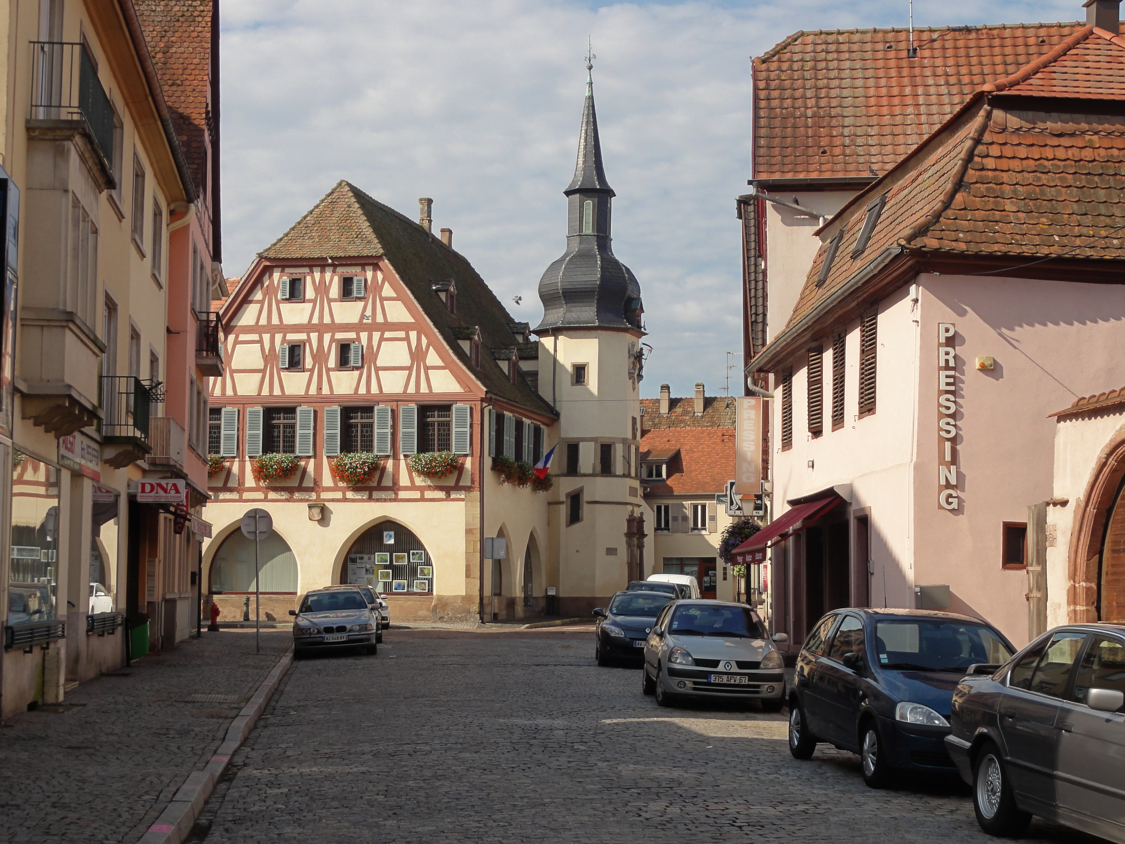 Alsace, Bas-Rhin, Benfeld, rue Clemenceau.